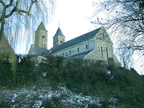 Sint-Odiliënberg: basiliek.